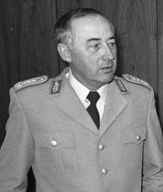 Wolfgang Altenburg, Generalinspekteur der Bundeswehr, im Verteidigungsausschuss des Bundestages